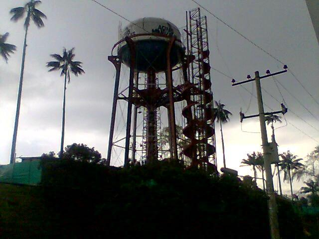 Muestra la remodelación de los tanques de chipre en manizales en el 2007